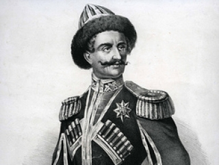 портрет легендарного предводителя северокавказских народов Шамиля, созданный художником Зоттой и литографом Падринелли в Милане в 1840 году.